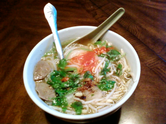 Kuyteav Cambodian styled noodles.